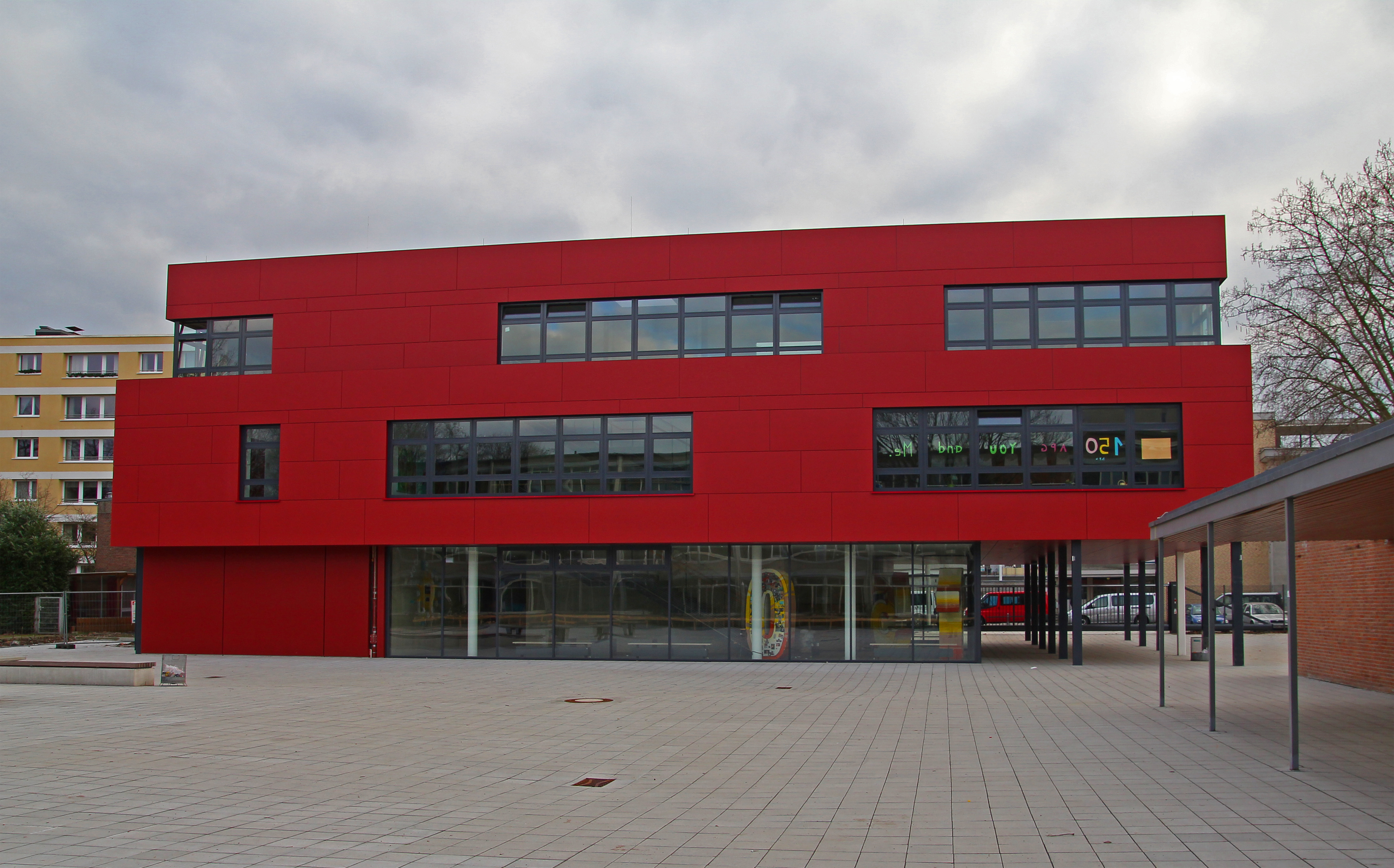 Eines der Gebäude des Apostelgymnasiums in Köln-Lindenthal. Ansicht vom Schulhof aus.